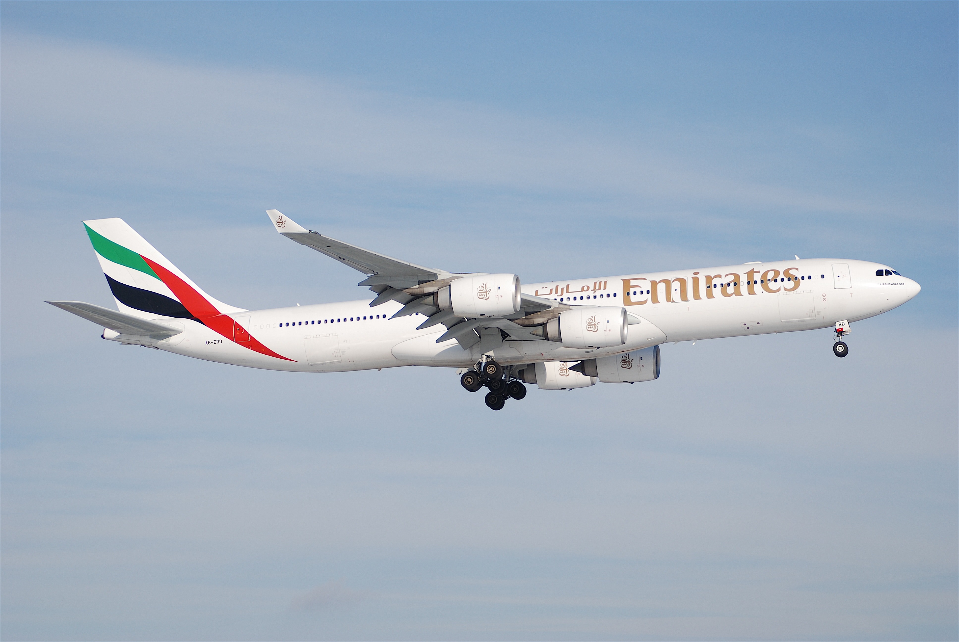 Emirates Airbus A340-500; A6-ERD@ZRH;28.01.2007/449eo